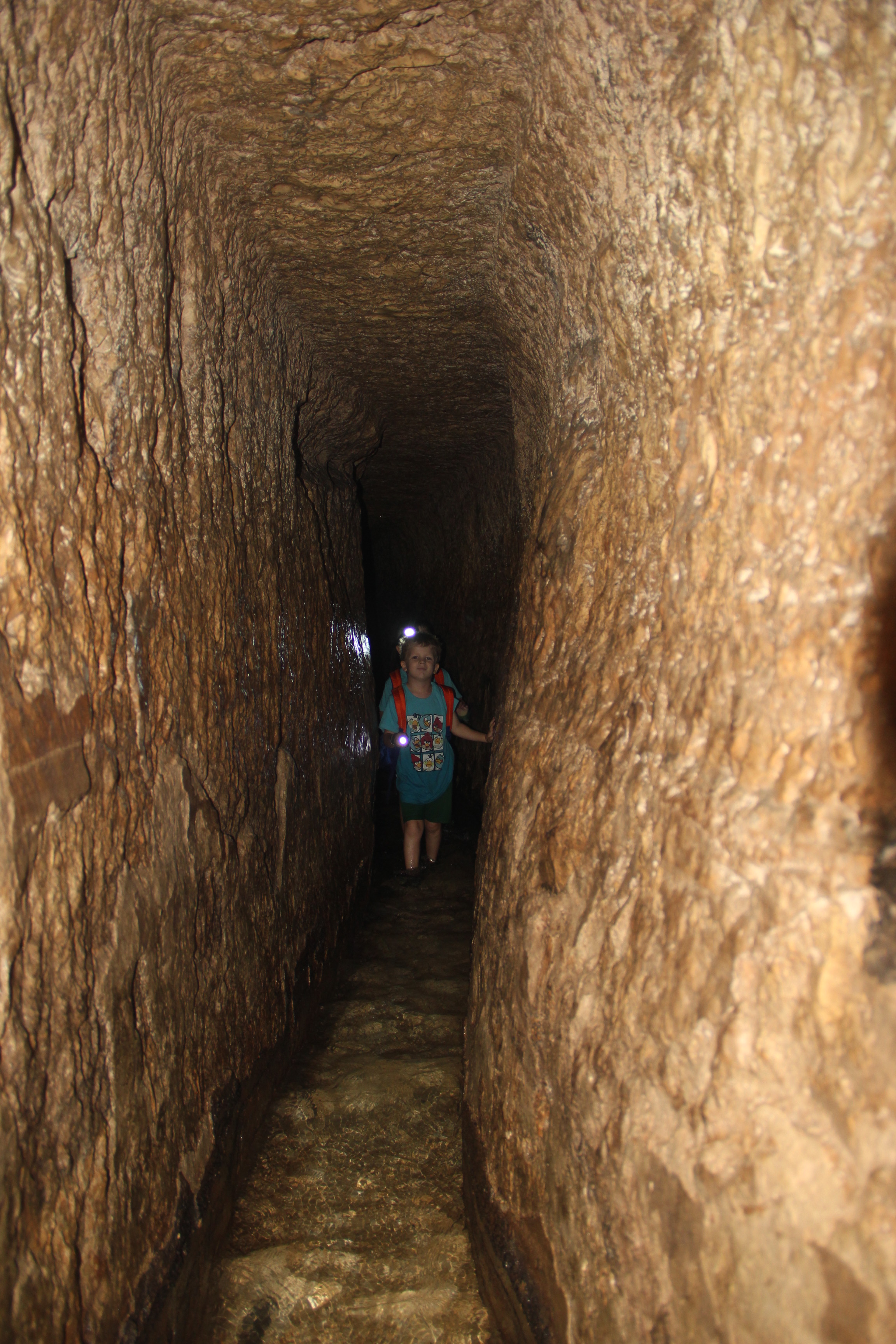 נקבת השילוח, עיר דוד